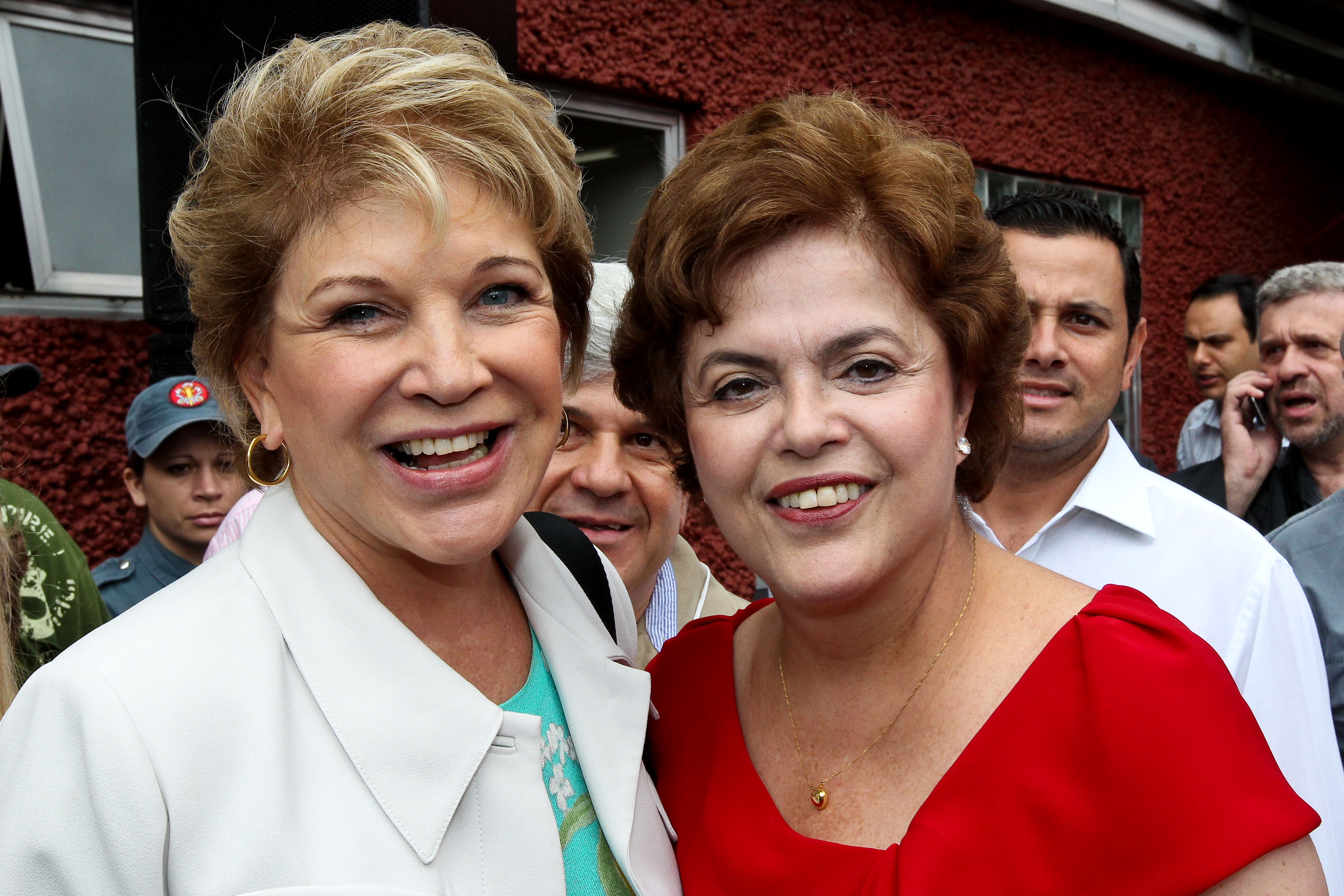 Dilma Rousseff e Marta Suplicy no lançamento das pré-candidaturas de Aloízio Mercadante e Marta Suplicy